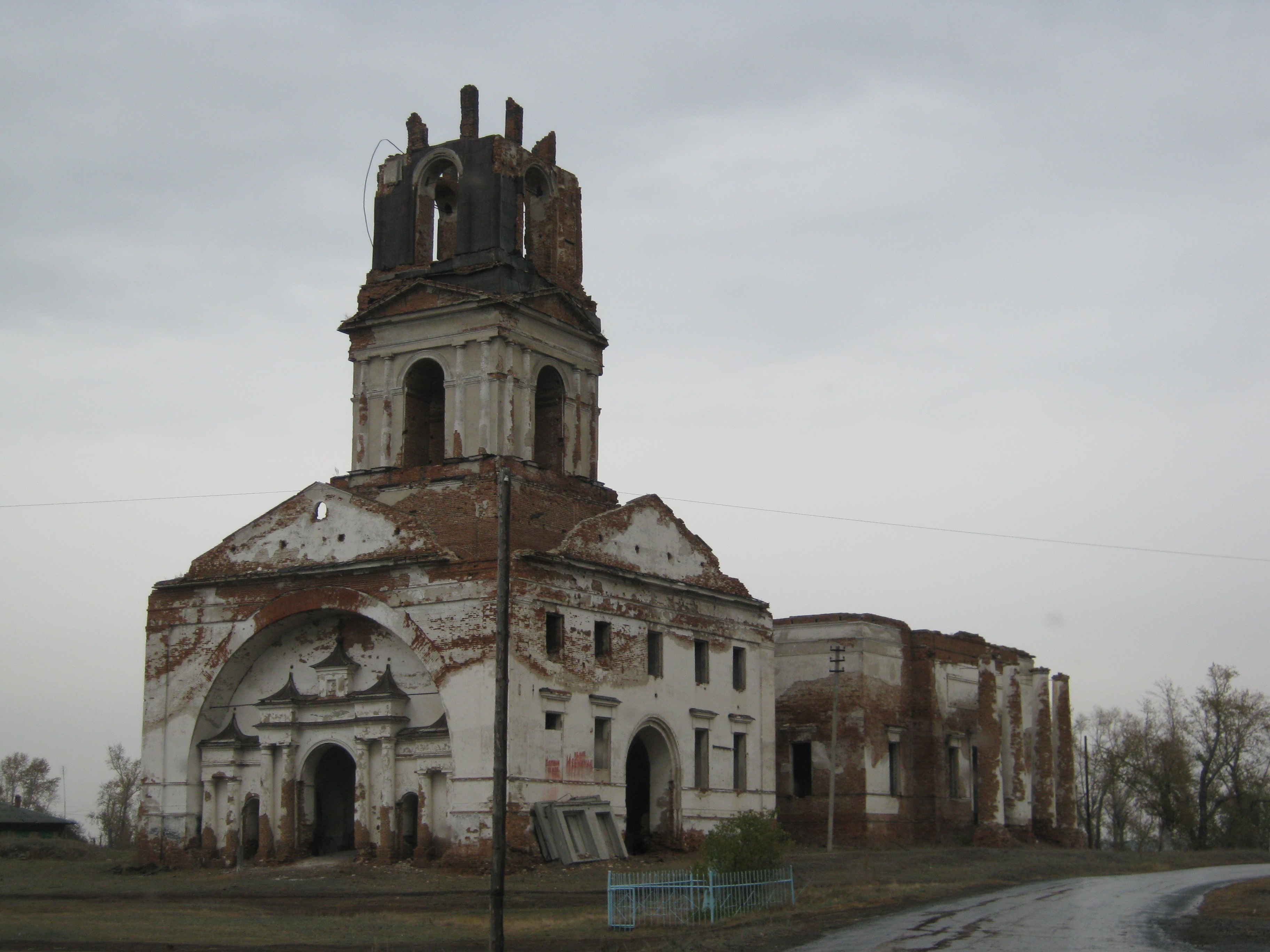 Окуневское. Церковь Сретения Господня